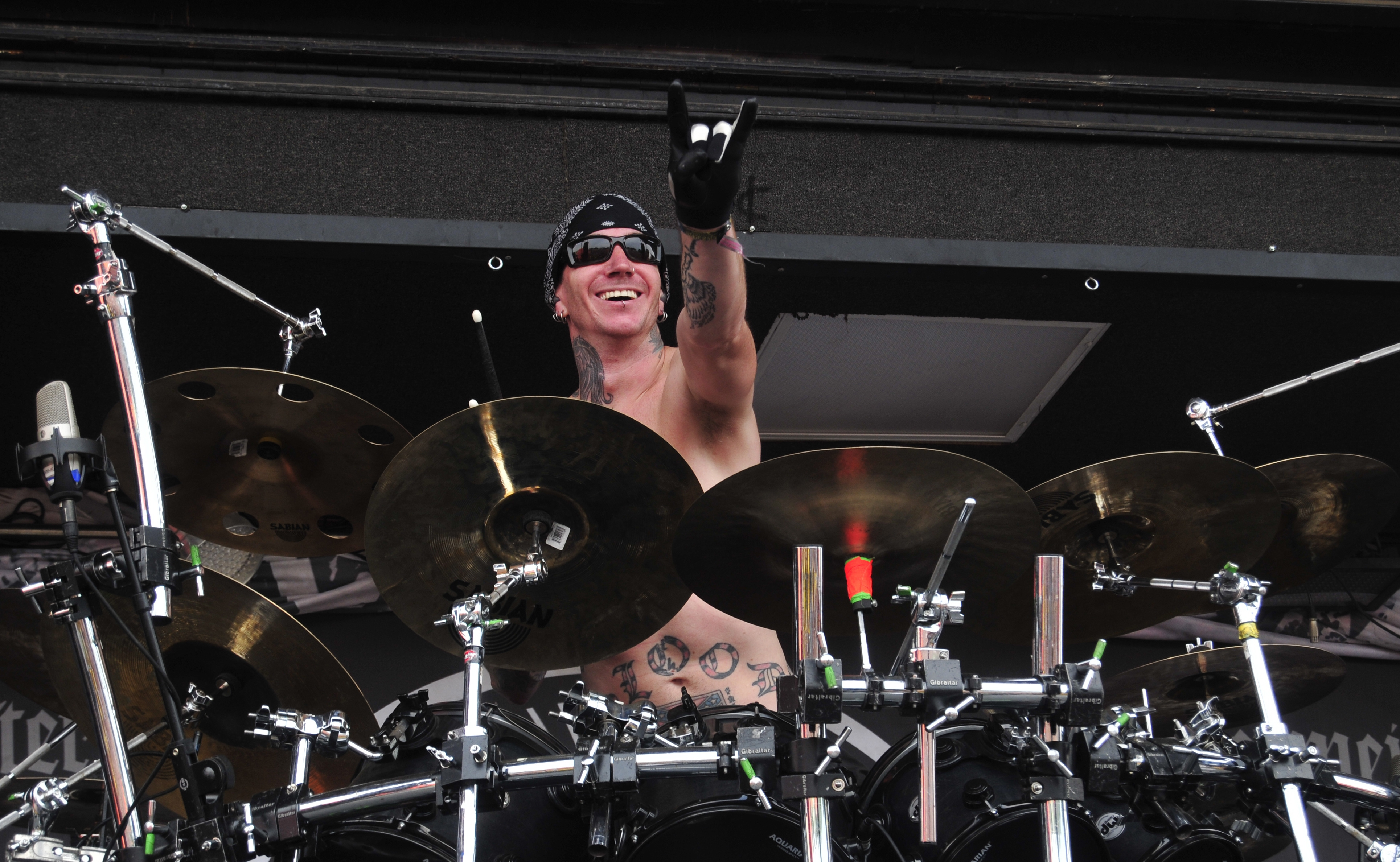 Travis Smith con i Trivium al Mayhem Fest ad Hatford